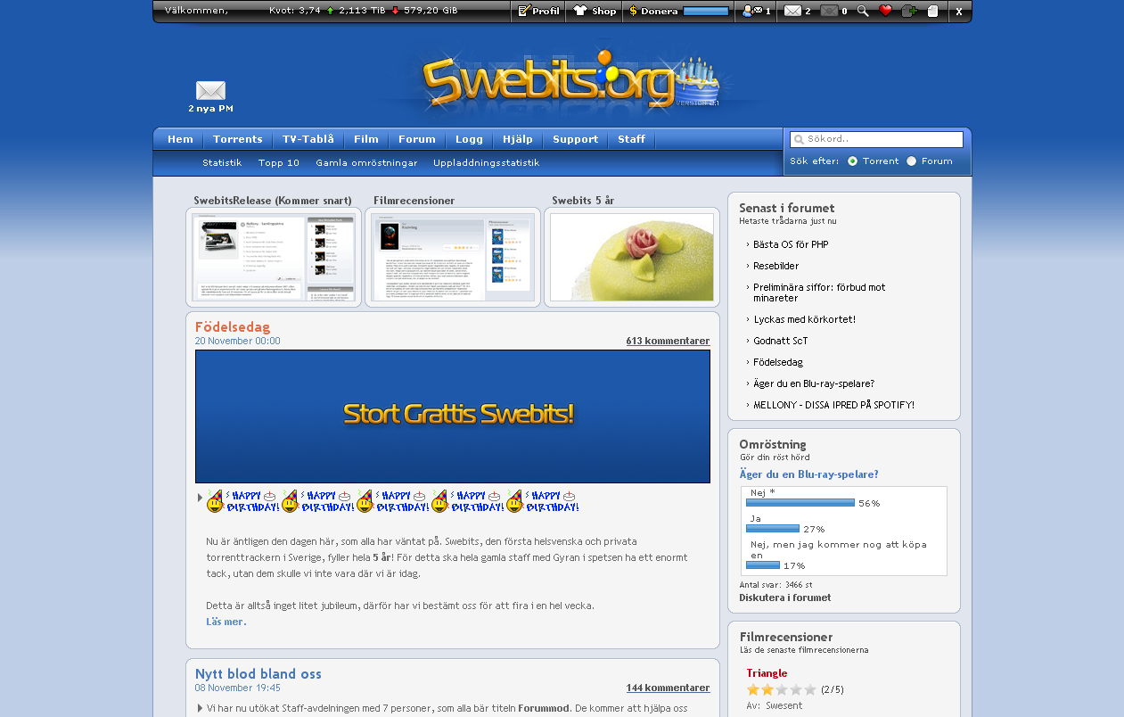 Skärmdump över startsidan november 2009